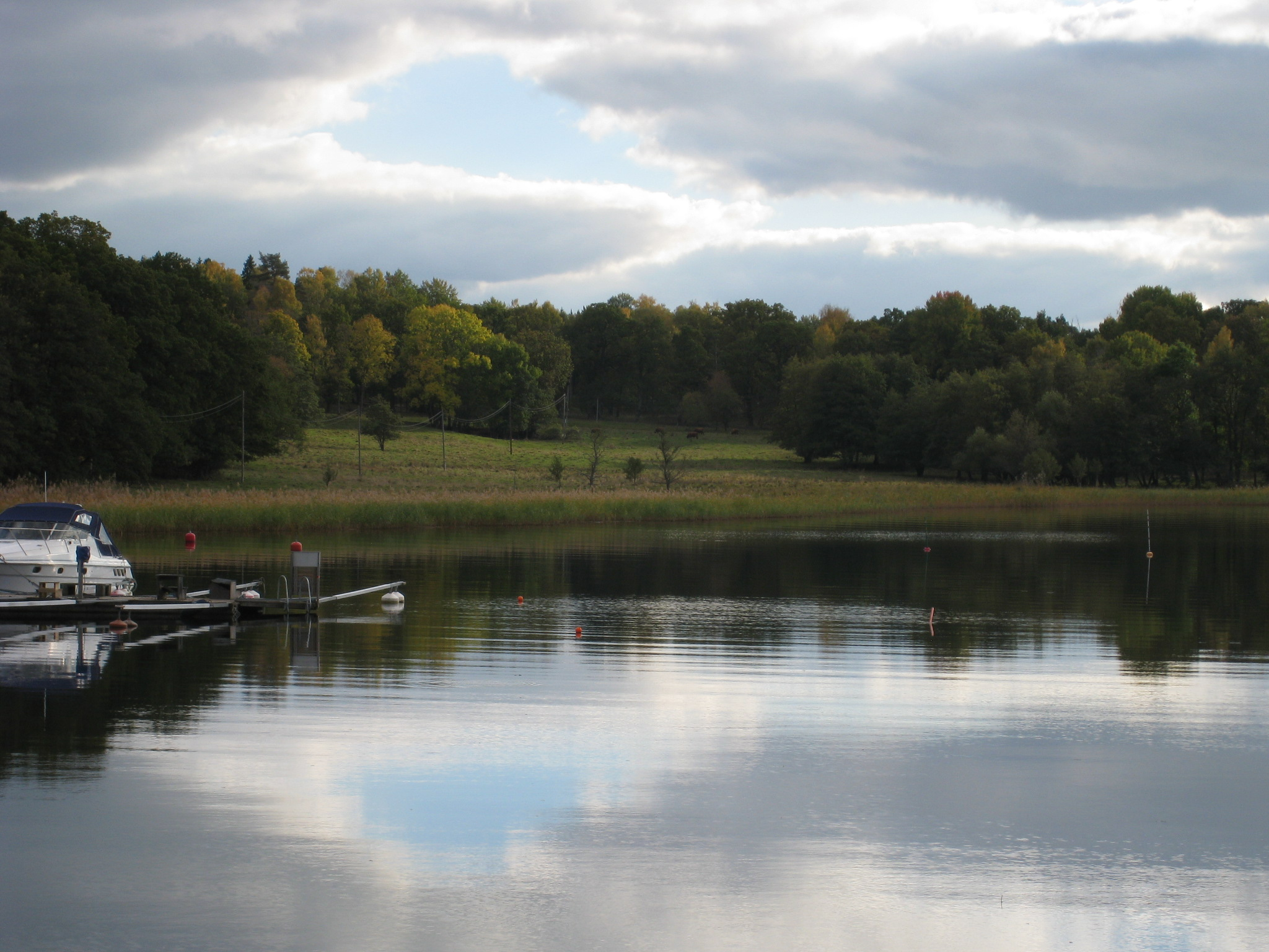 Hummelmora hage, vy från Koffsan mot Hummelmora, Järfälla kommun, Stockholms län.